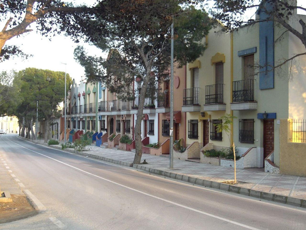 Aigües (Alacantí). Entrada principal al poble.